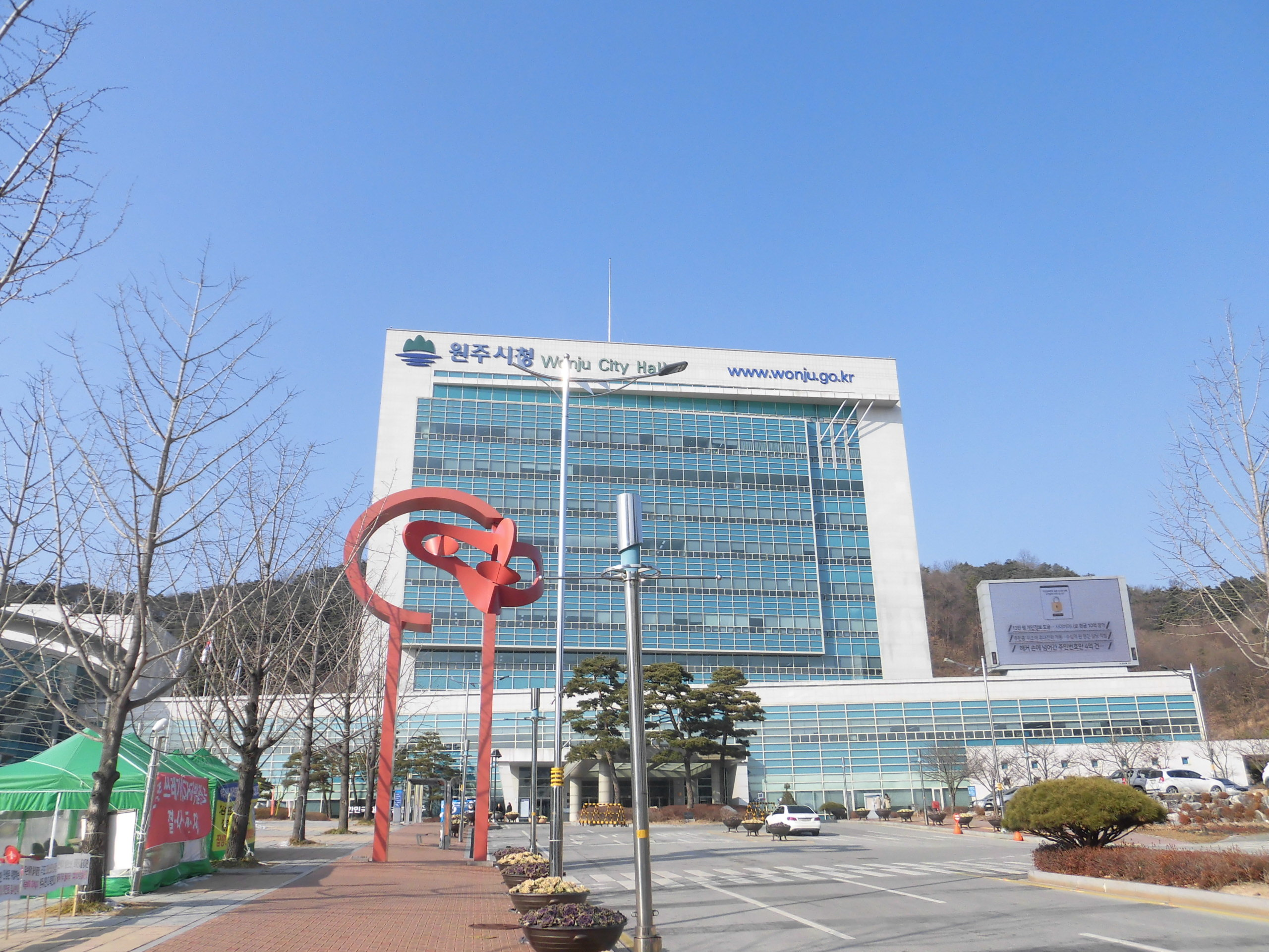 강원도 원주시에 있는 원주시청